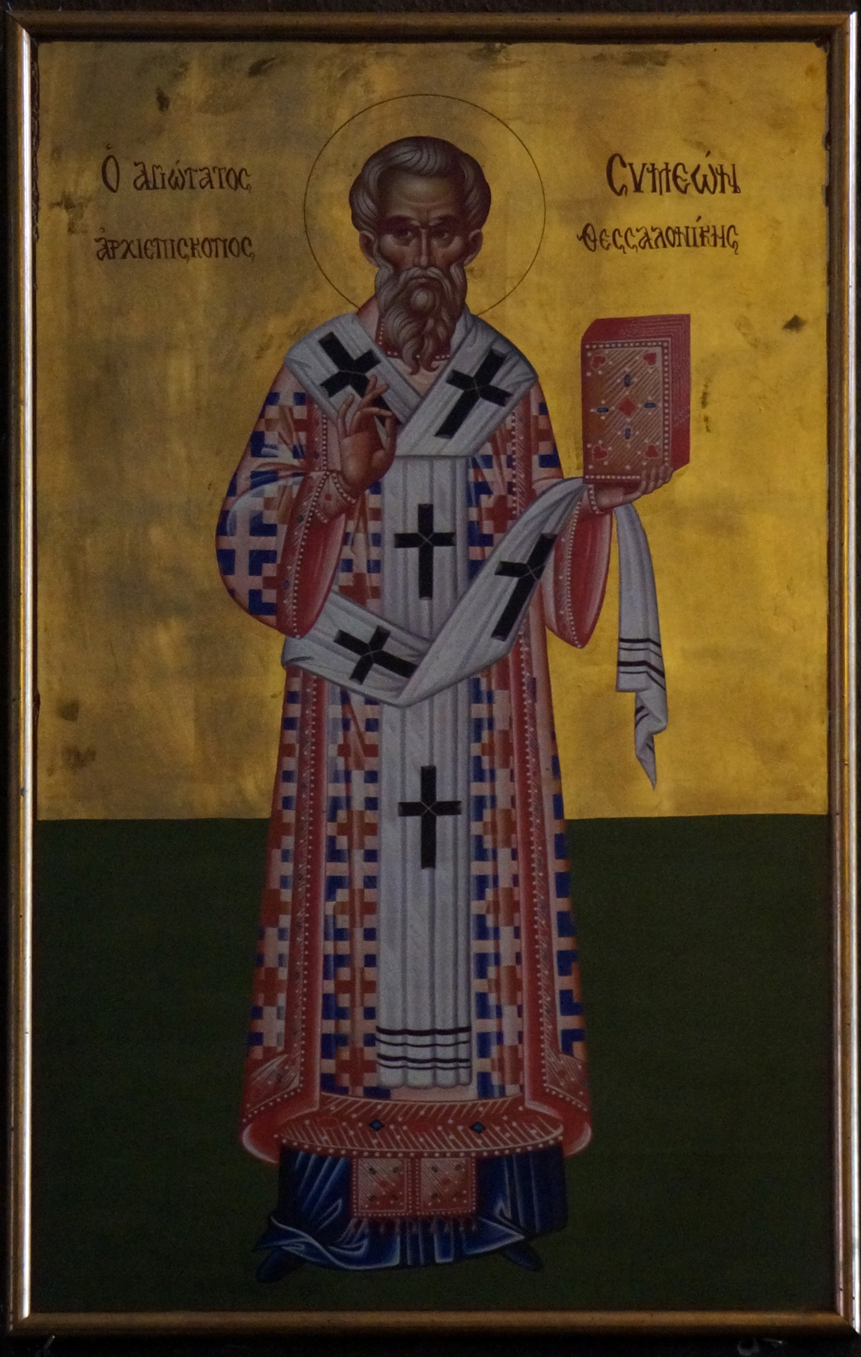 peinture en l'église de sainte sophie de Salonique.